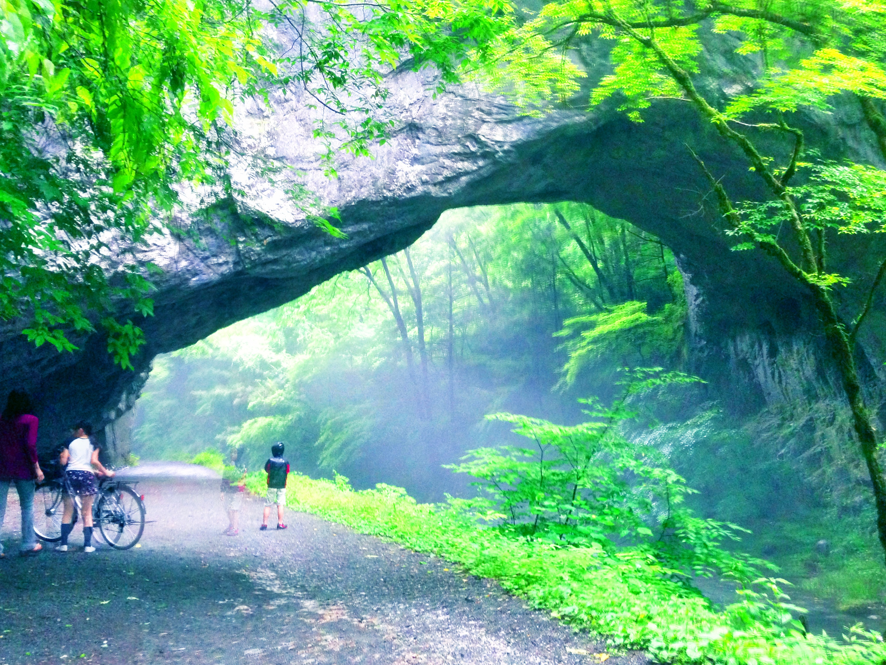 帝釈峡の雄橋(上流方向より）